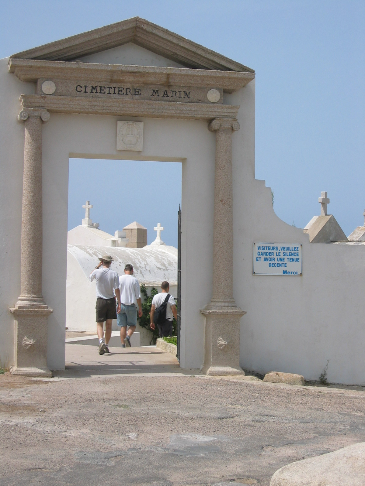 Bonifacio (Corse-du-Sud, France) - Entrée du Cimetière marin.